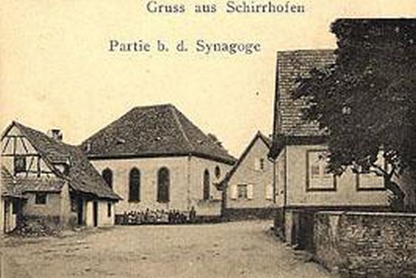 Ansichtskarte von Schirrhoffen im Elsass